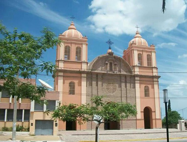 Catedral Ntra. Sra. del Carmen - Cruz del Eje